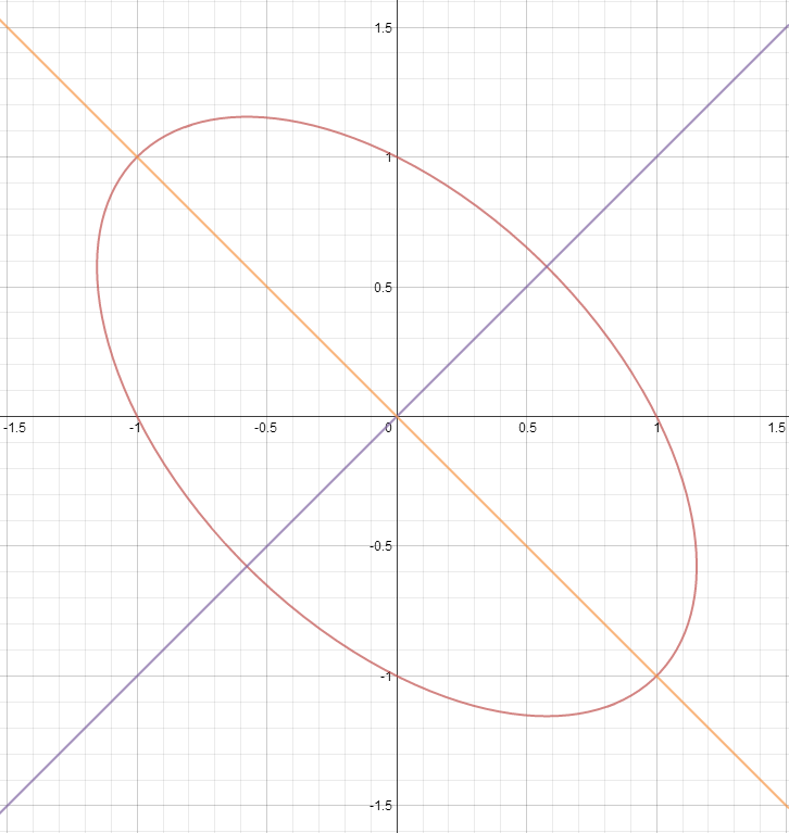 Graph created at